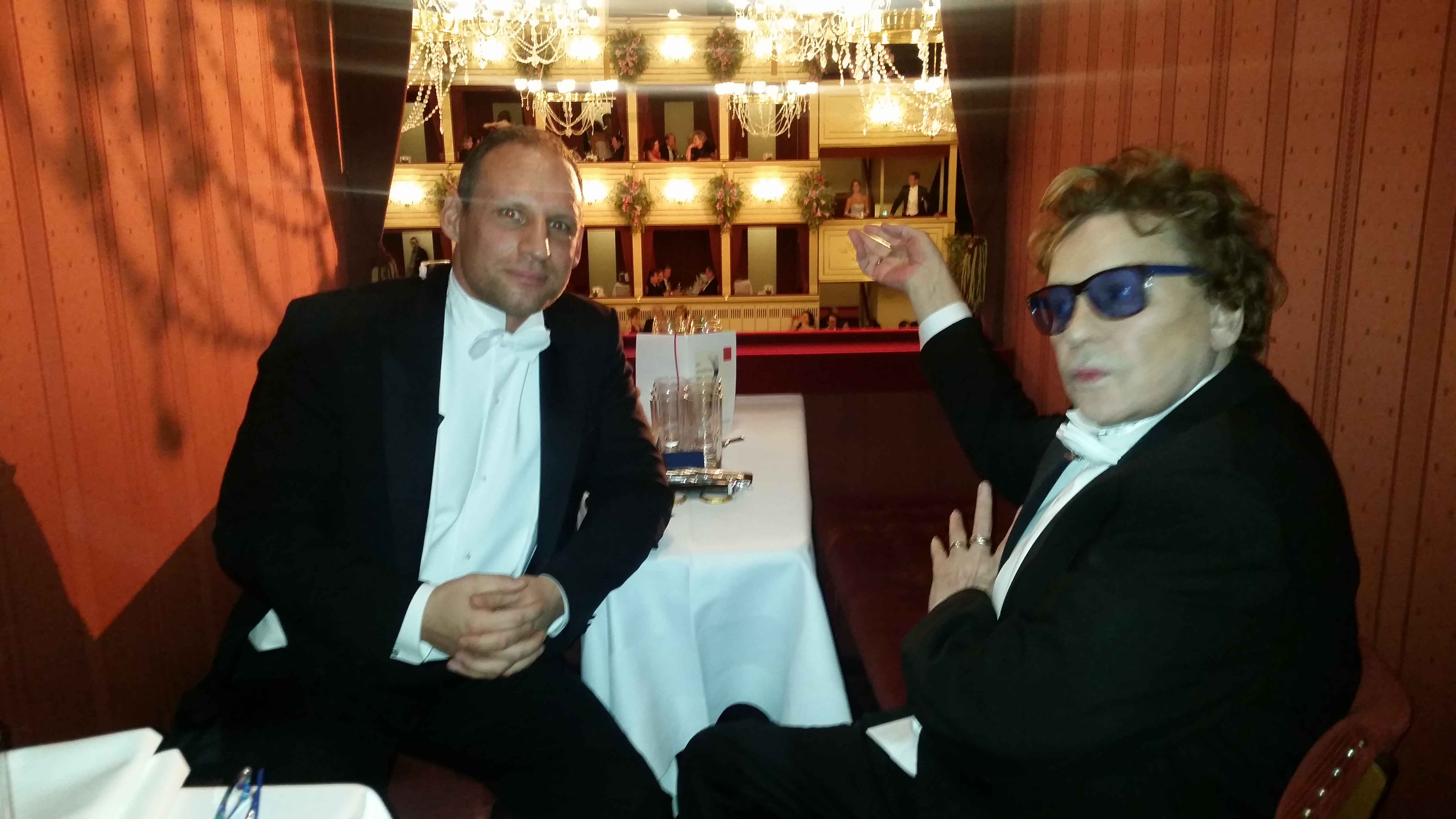 links Josef Leutgeb, rechts Schauspieler Helmut Berger am Wiener Opernball 2015